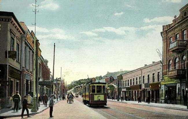 Begin-Aleksandrovskaya-c-SA.jpg: Олександрівська лінія. Київський трамвай